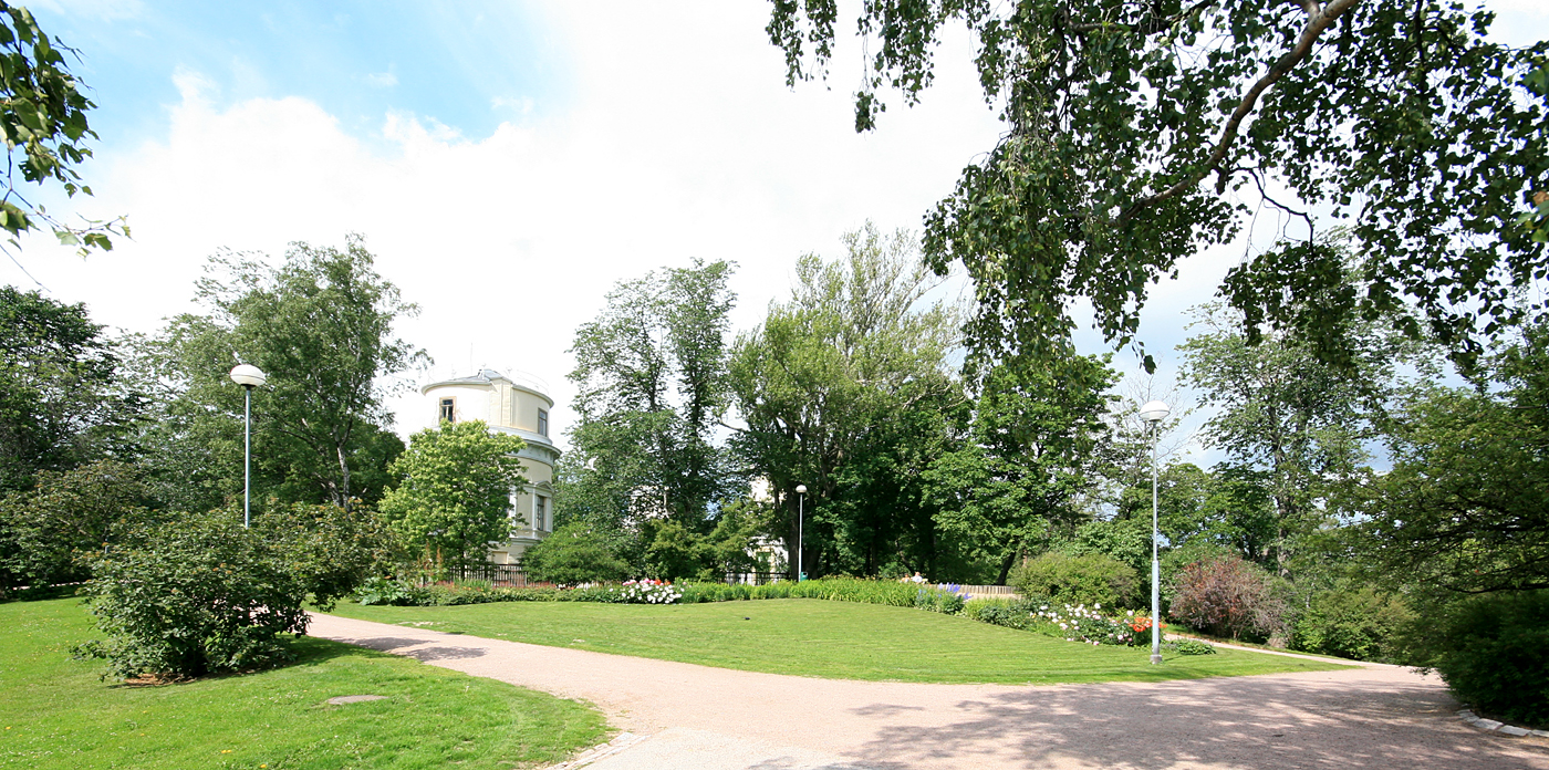 Tähtitorninmäki, Helsinki.